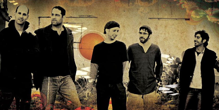 בין השמשות